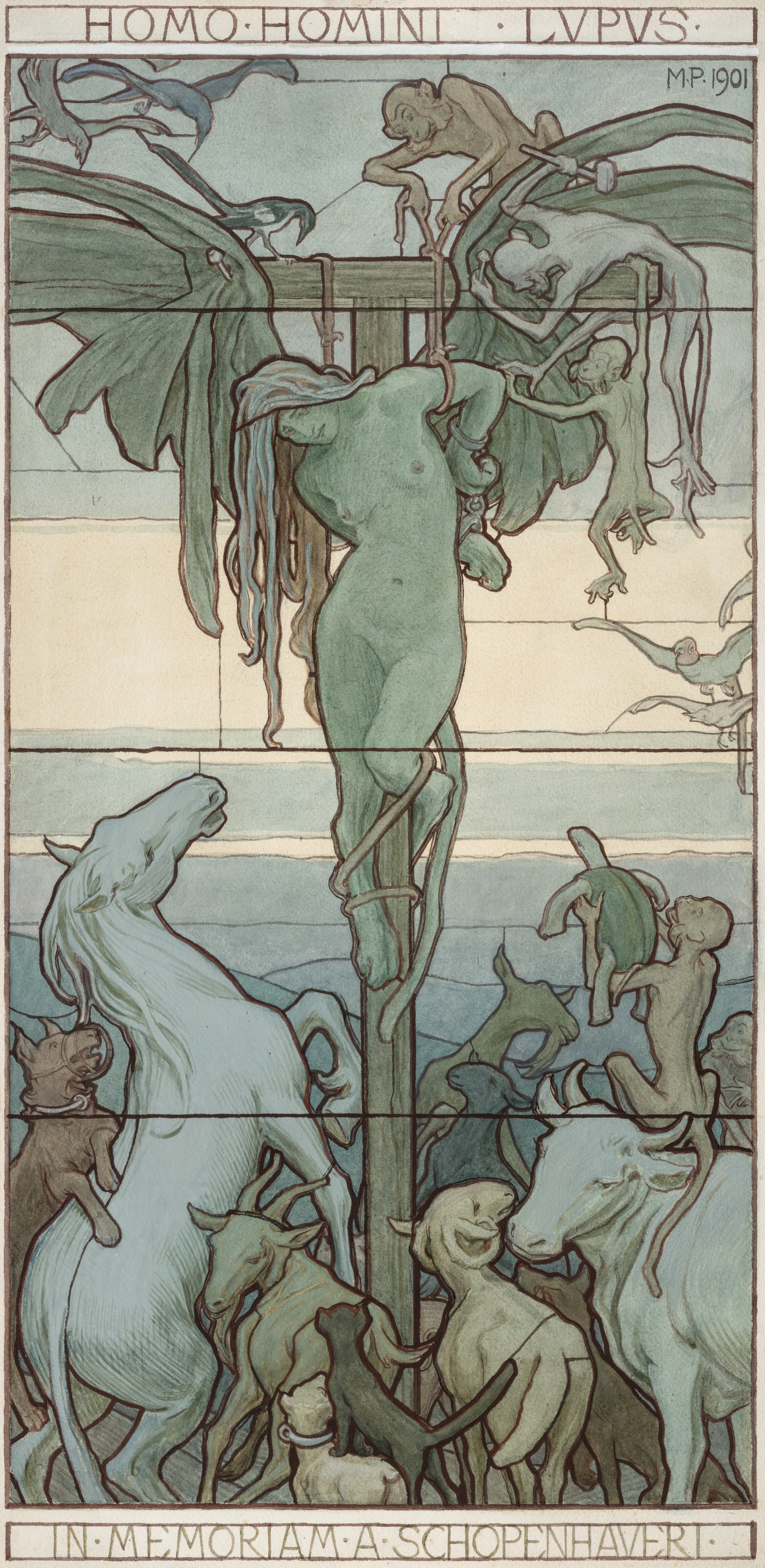 Max Pirner, Homo homini lupus (1901), akvarel 960 x 474 mm, sbírka kresby Národní galerie v Praze, Inv. č. DK 2231